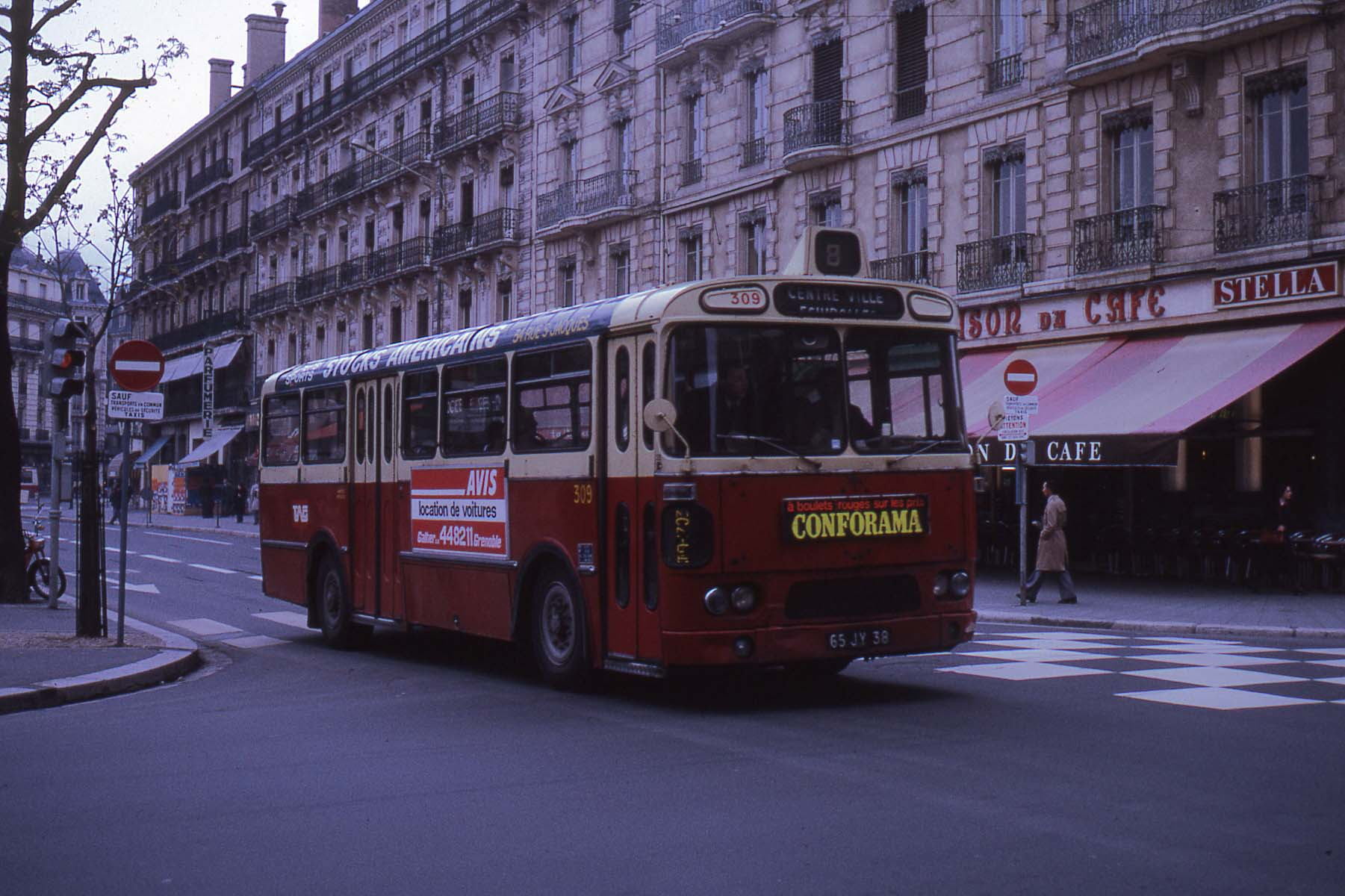 Un autobus Berliet PH80 à Grenoble, place Victor Hugo en 1975.